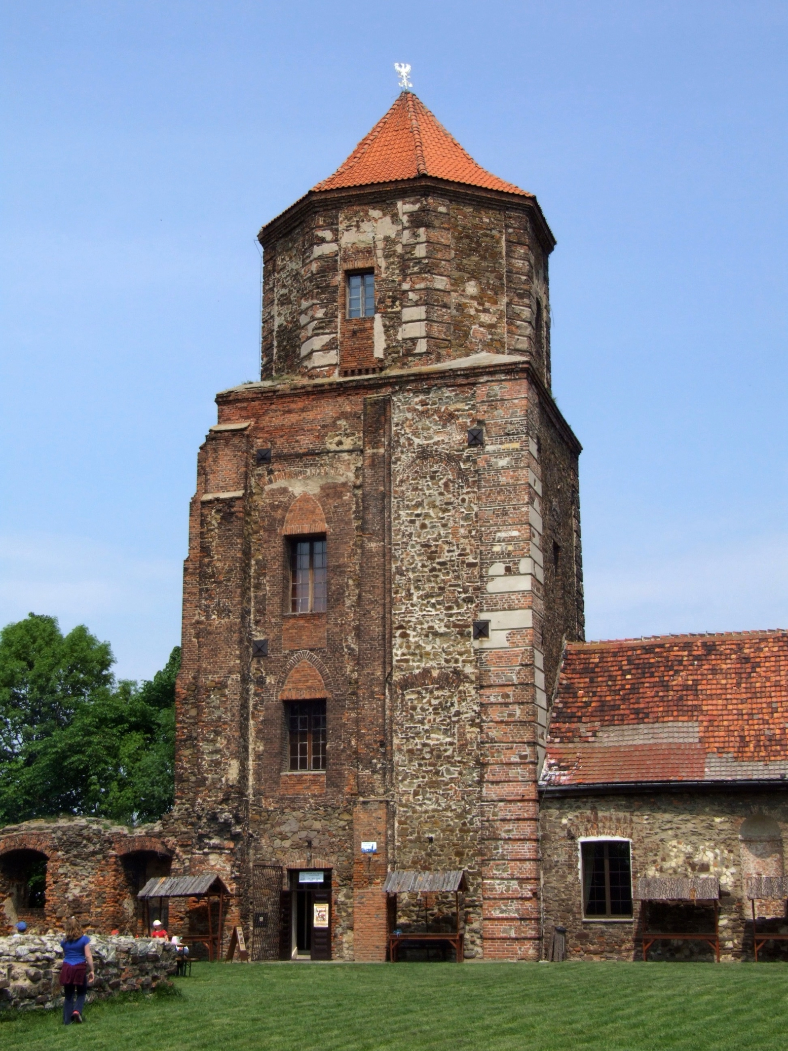 Toszek (Tost) - wieża na zamku